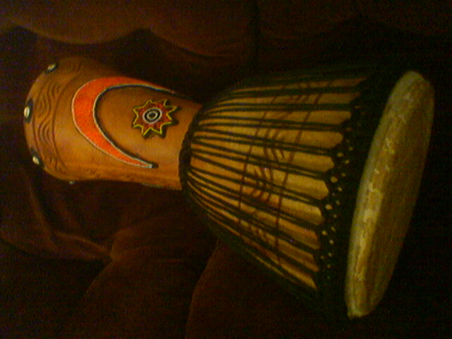 Djember